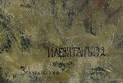 Левитан. Владимирка. Версия без рамки.